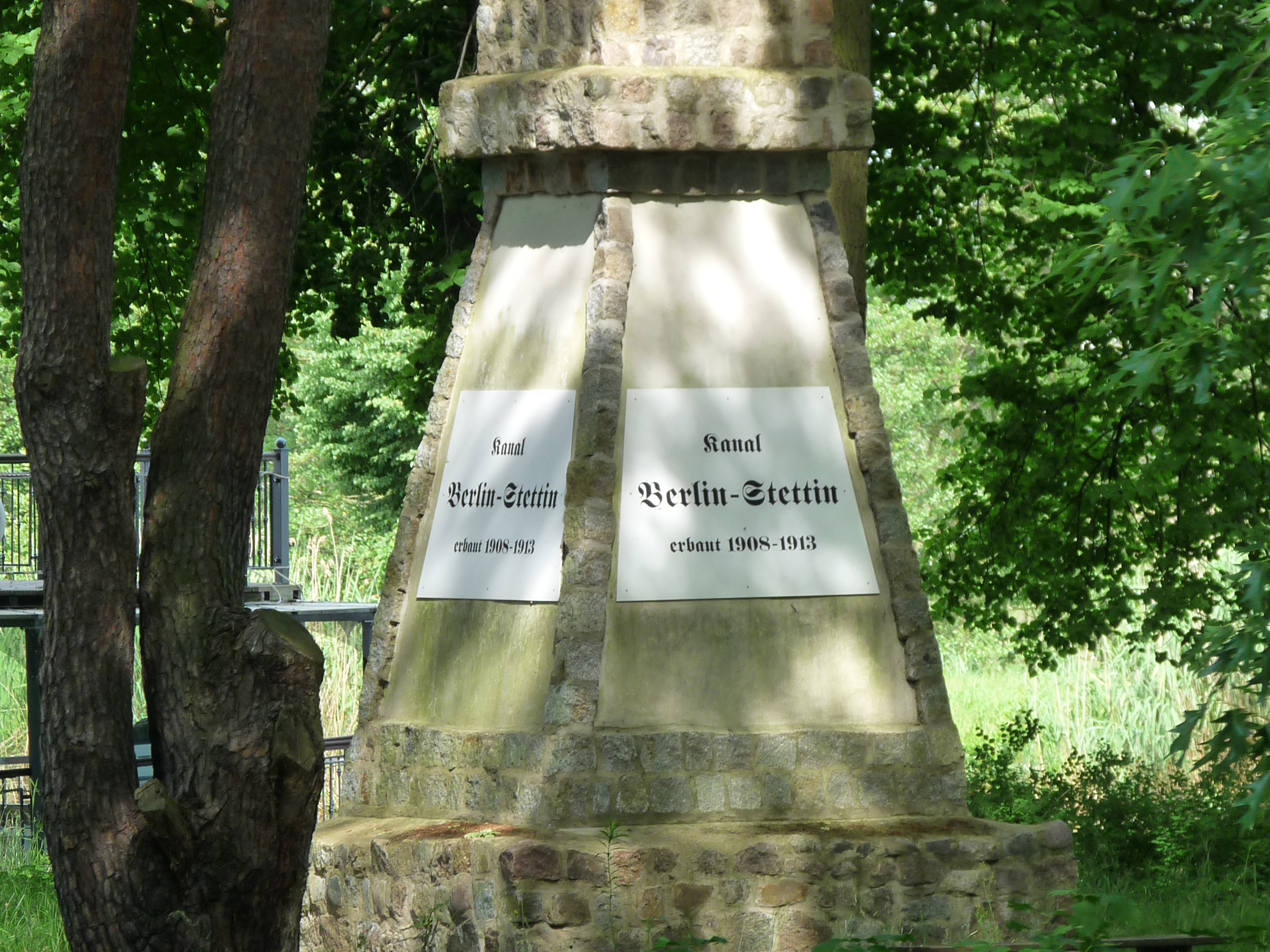 Bei der Eröffnung der neuen Wasserstraße am 17. Juni 1914 gab Kaiser Wilhelm II. der bis dahin fertiggestellten Wasserstraßenverbindung von Plötzensee bis zur Oder bei Hohensaaten den Namen Hohenzollernkanal. Obelisk auf dem Gelände der Werft Malz zur Erinnerung an den Kanalbau.